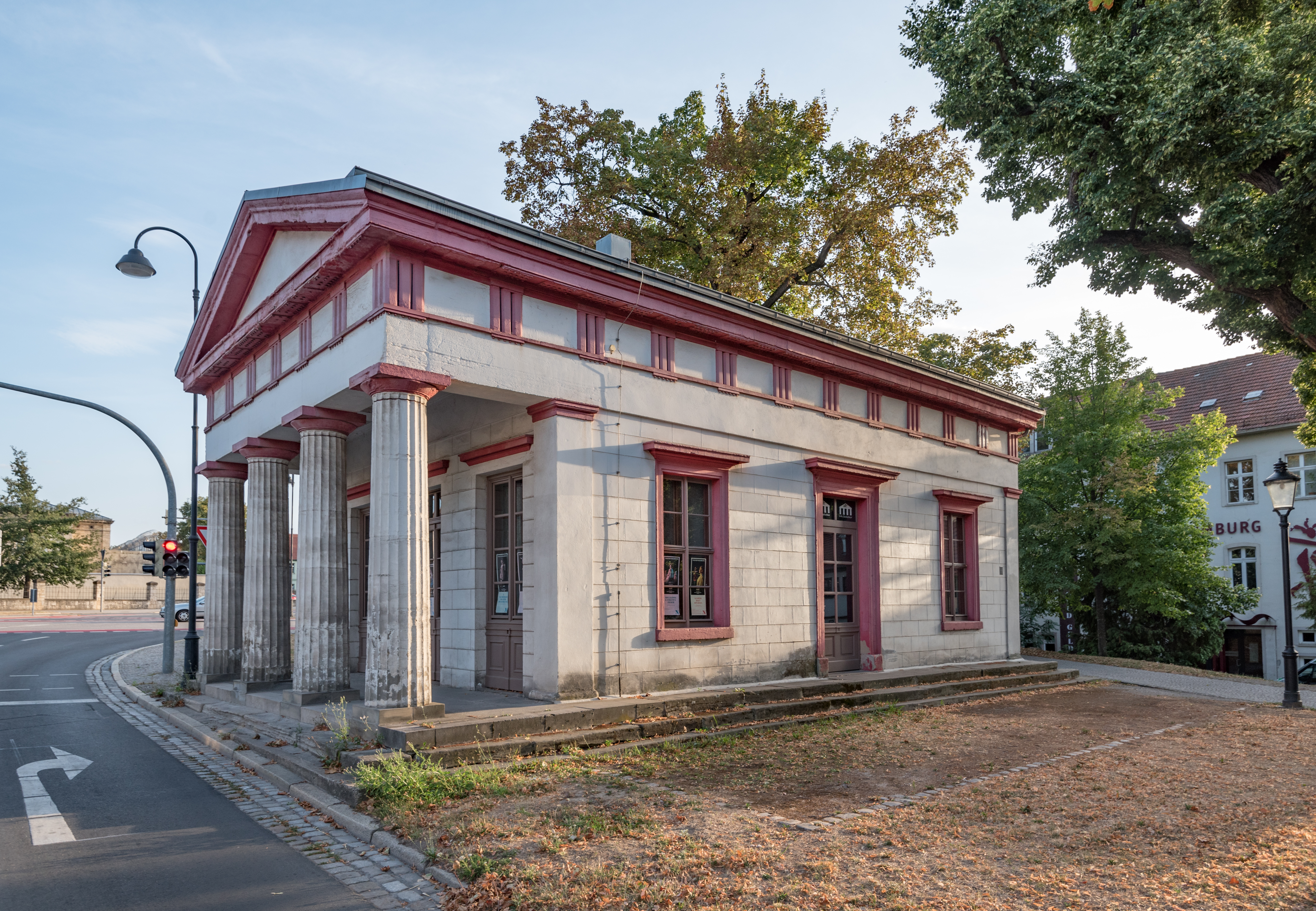 Naumburg (Saale), Am Salztor 8